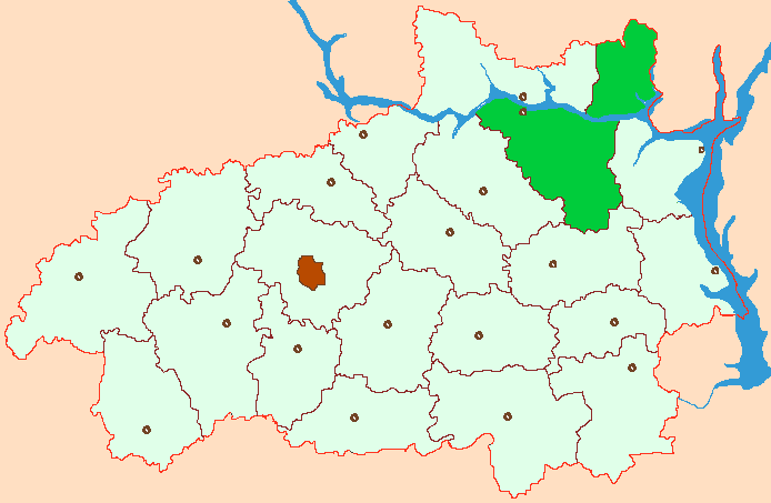 Ivanovo Oblast map by Al Silonov Карта районов Ивановской области